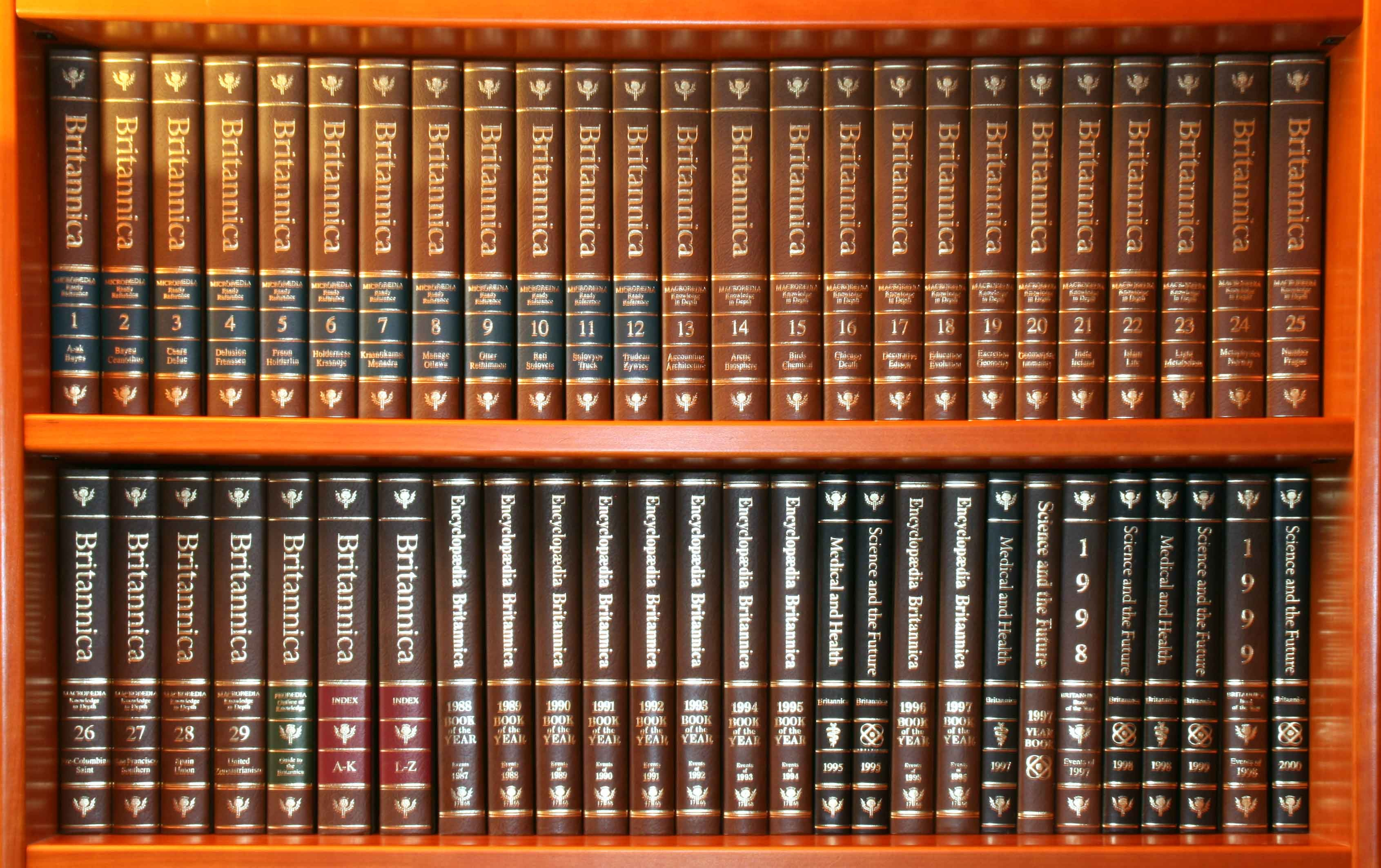 D'Britannica mat Joerbicher.